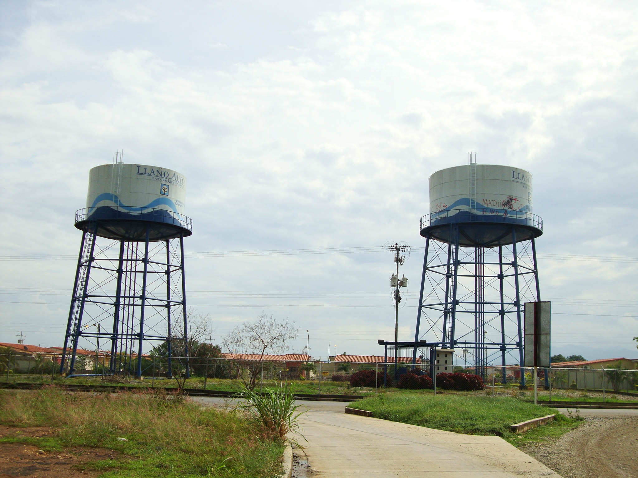 Araure, Portuguesa, Venezuela